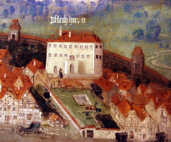 Ansicht des Pflegschlosses auf einer Darstellung der Stadt Altdorf in Schrägaufsicht von Norden 1575 (StAN)